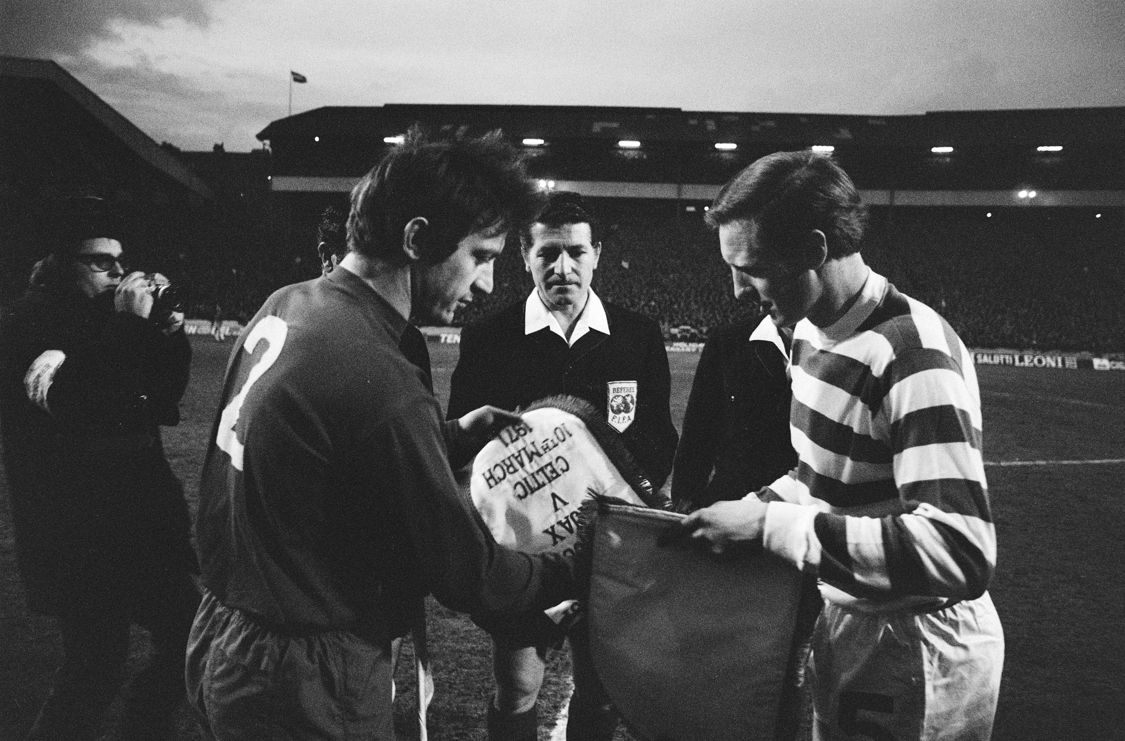 Collectie / Archief : Fotocollectie Anefo Reportage / Serie : Europacup I kwartfinale, voetbalwedstrijd Celtic - Ajax: 2-0 Beschrijving : Aanvoerders wisselen vaantjes uit bij de aanvang van de wedstrijd Datum : 24 maart 1971 Locatie : Glasgow, Groot-Brittannië Trefwoorden : spelers, sport, voetbal Instellingsnaam : AJAX Fotograaf : Fotograaf Onbekend / Anefo Auteursrechthebbende : Nationaal Archief Materiaalsoort : Negatief (zwart/wit) Nummer archiefinventaris : bekijk toegang 2.24.01.05 Bestanddeelnummer : 924-3911